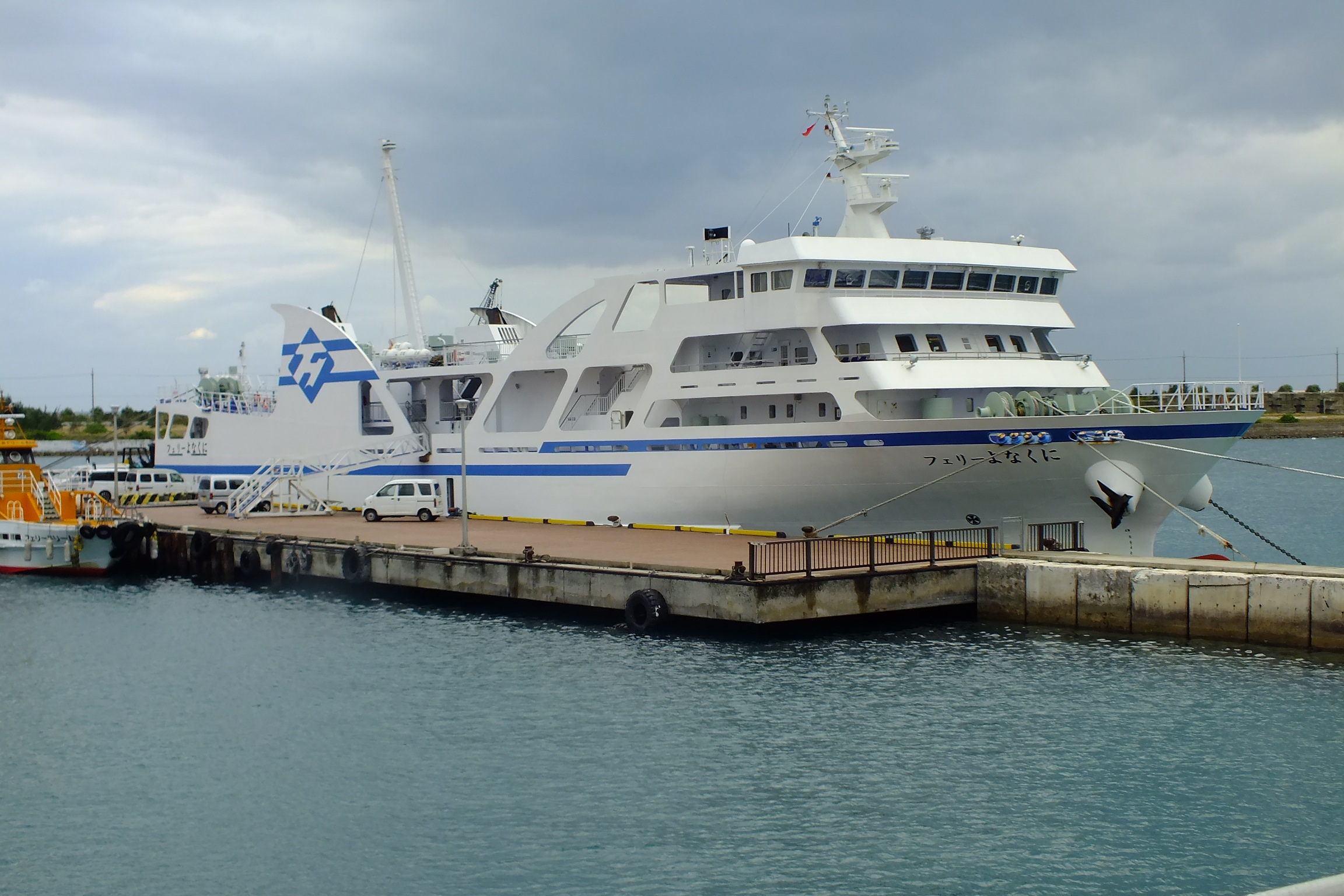 フェリーよなくに 総トン数：753トン 全長：68m、幅：12.8m 旅客定員：120名 車両搭載数：乗用車換算36台 貨物積載量：364トン。 2014年7月18日就航。熊本ドック建造